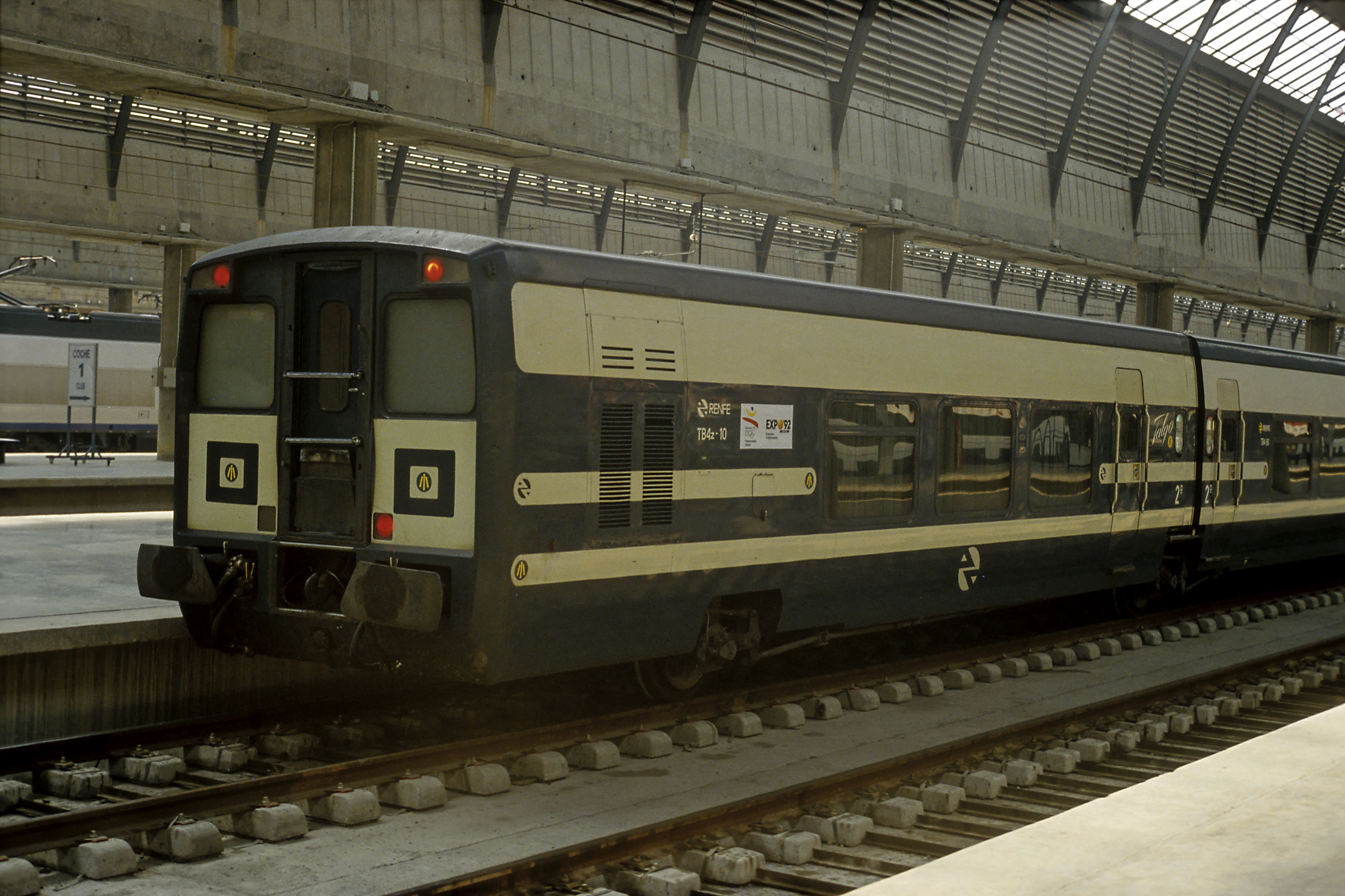 Talgo-4-Endwagen, die erste Serienbauart Talgo Pendular. Nicht spurwechselfähig, mit nach innen öffnenden Klapptüren und im Vergleich zu den Nachfolgebauarten sichtbar größeren Fenstern. Bf Sevilla S.J., Breitspurseite, zum Aufnahmezeitpunkt tragen Talgowagen nur talgoeigene Wagennummern, die keine Eigenschaften codieren. UIC-EDV-Nummern wurden erst nach 2005 angeschrieben.See also: Talgo.